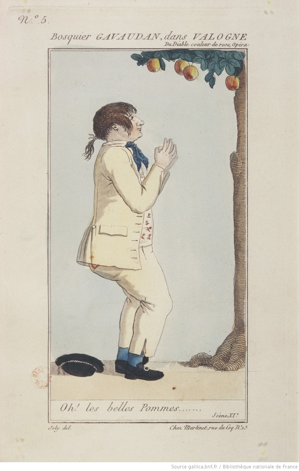 Bosquier-Gavaudan dans le rôle de Valogne dans Le Diable couleur de rose (1798)